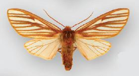 Pseudohemihyalea fallaciosa female